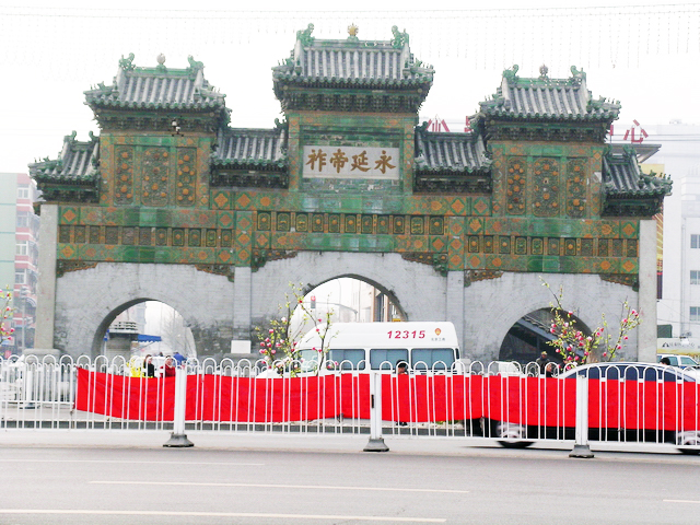 东岳庙琉璃牌坊“永延帝祚”，smartneddy摄于北京东岳庙，替她传